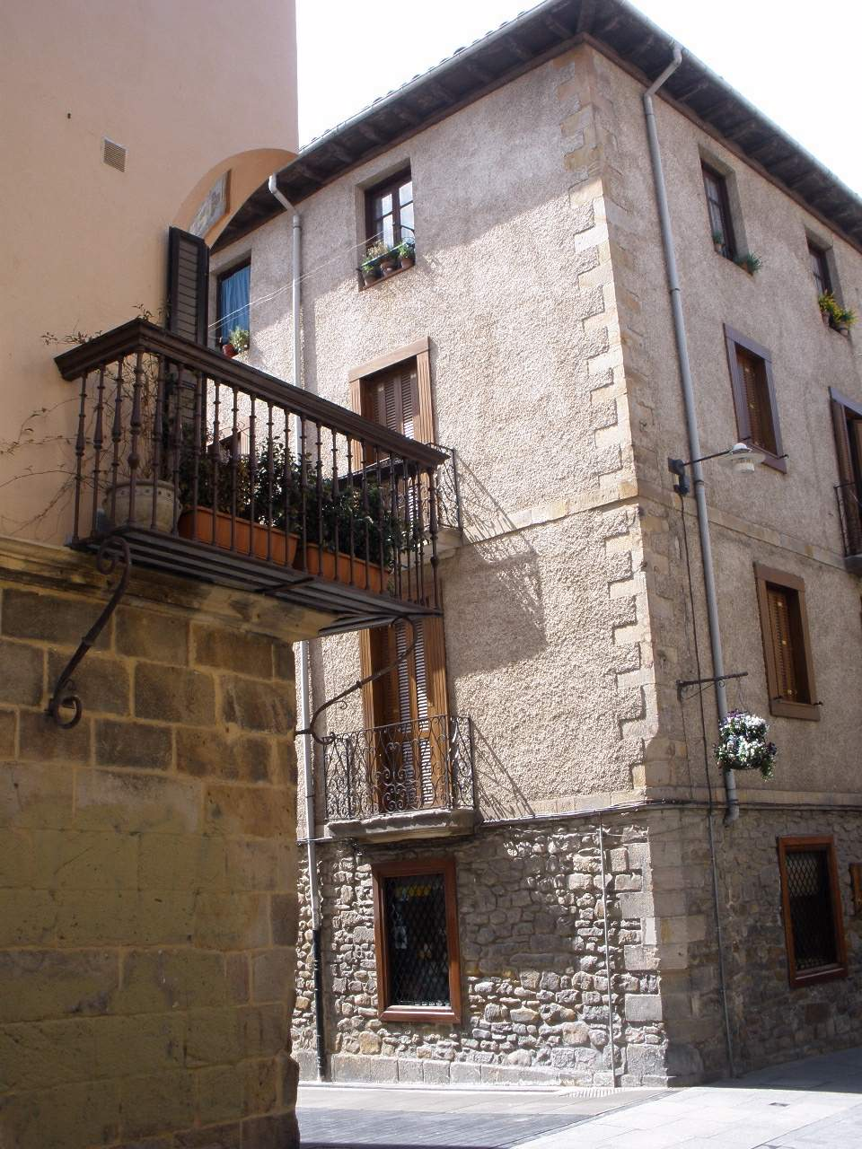 Oñate (Gipúzcoa)